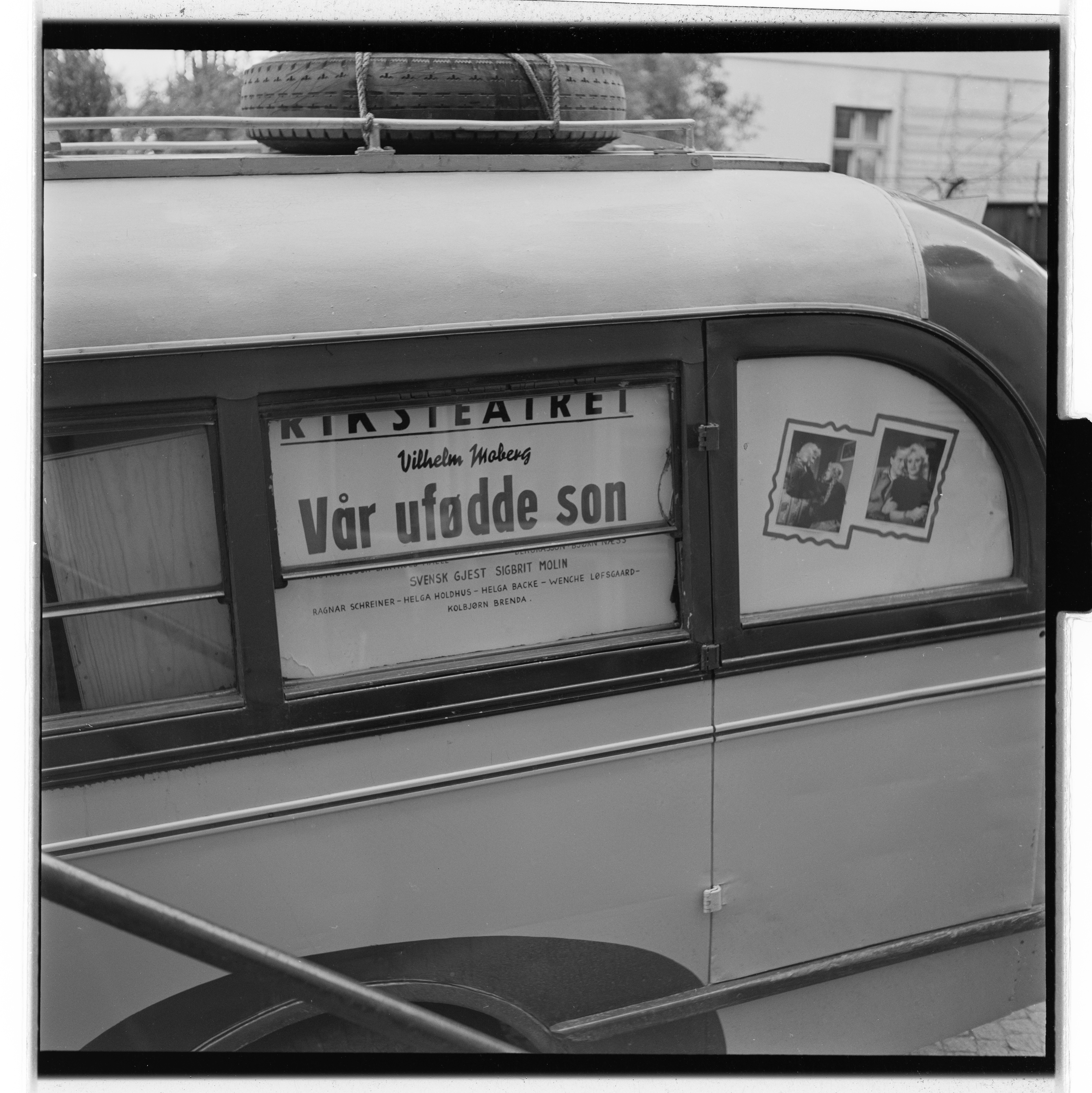 Bildet er hentet fra Arkivverket. Riksteatret 1953. NÅ nr. 20, 1953. Foto: Køpke og Hartun "Annea Christie av Eugene O'Neill: Ingolf Rogde, Lalla Carlsen, Jorunn Fjærli, Gunnar Simenstad. "Vår ufødde son" av V. Moberg: Sigbrit Molin, Ragnar Schreiner, Kolbjørn Brenda, Helga Holdhus, Wenche Løfsgaard, Helga Backe, Tove Torvik, Alf Hellund. Arkivinstitusjon : Riksarkivet Arkivnavn : Billedbladet NÅ Sted : Norge, Ukjent, Ukjent, Emneord: Teater, Buss, Reklame Avbildet